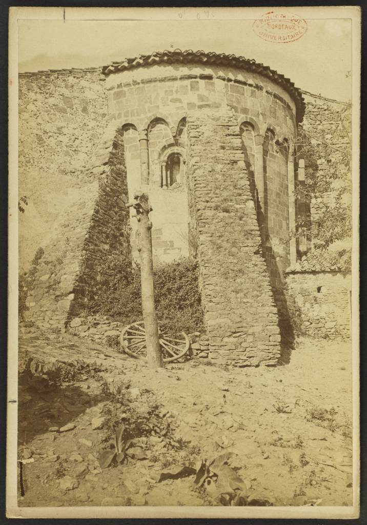 Eglise Saint-Félix à Calmeilles